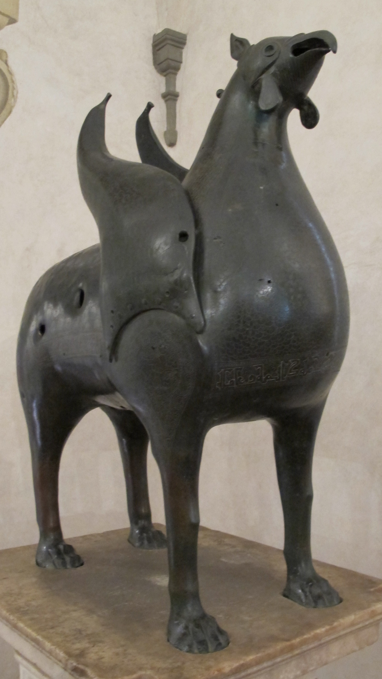 Arte islamica, ippogrifo, XI sec